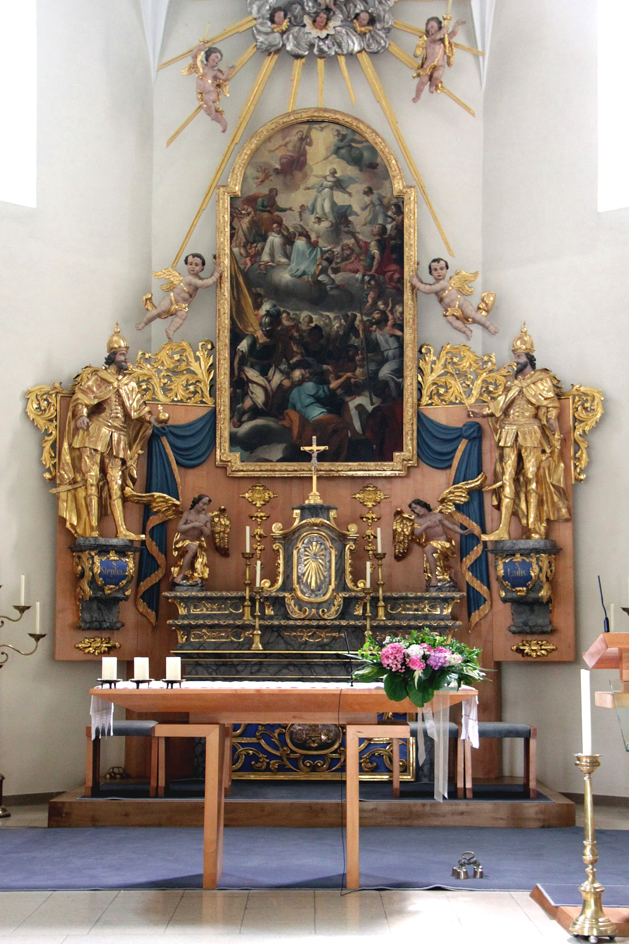 Denkmalgeschützte römisch-katholische Pfarrkirche in Rotenturm an der Pinka